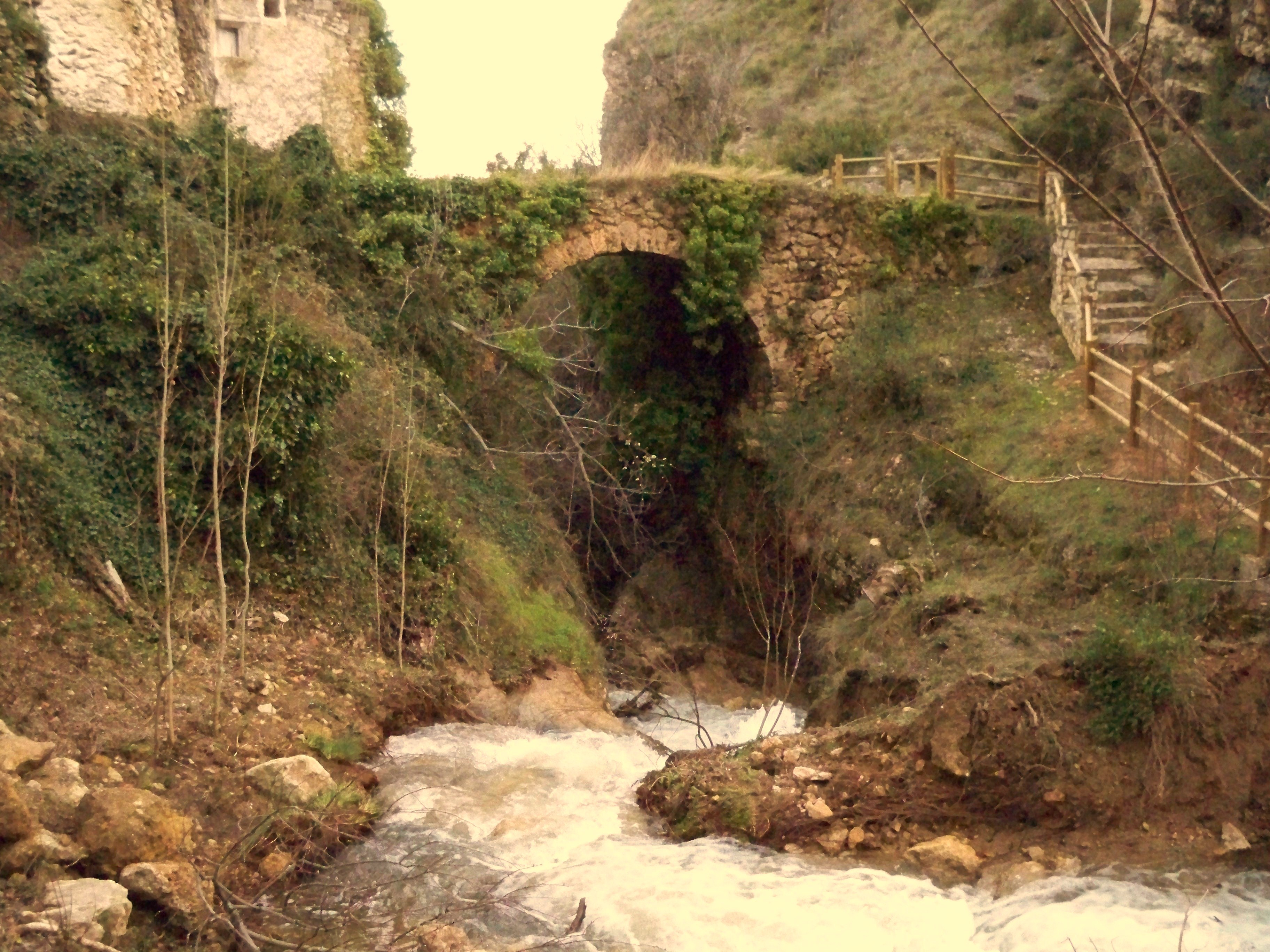 Acueducto de Molinicos (Albacete)